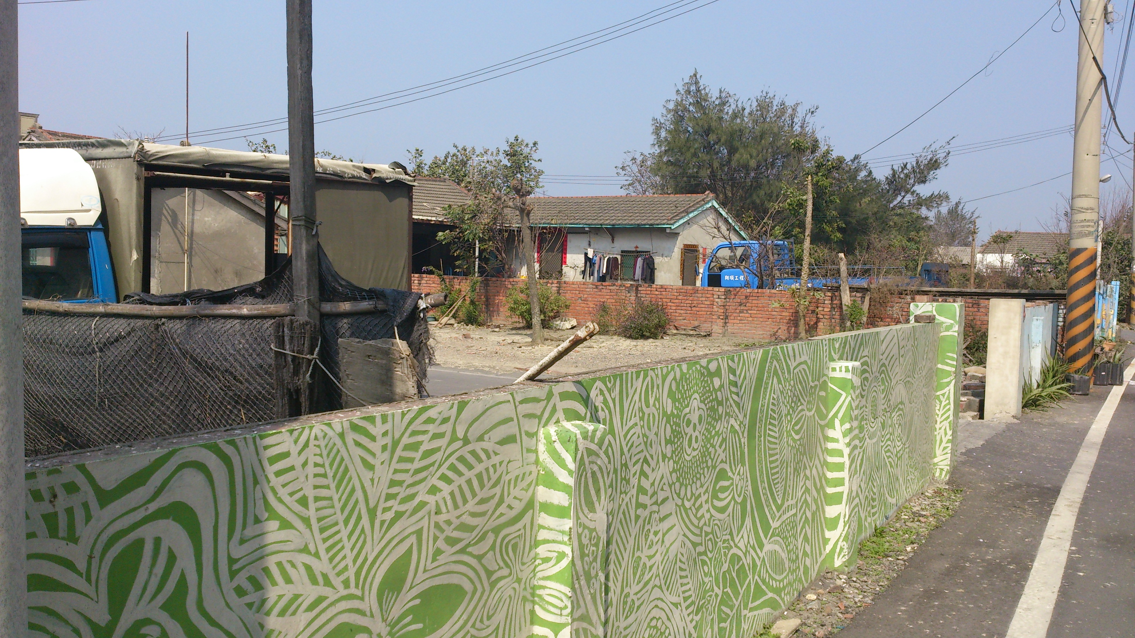 楊厝社區內的彩繪牆(部分)